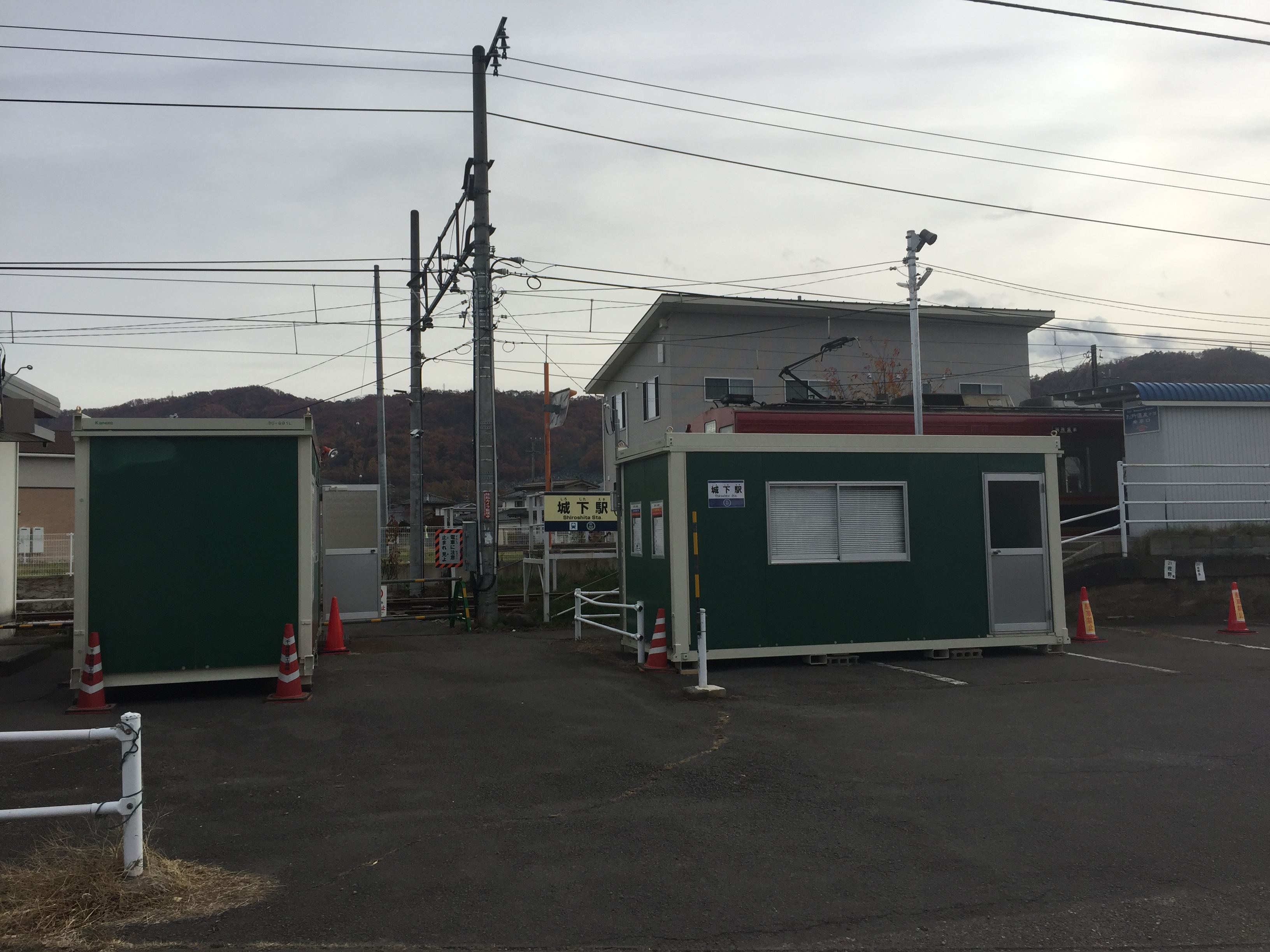 台風の影響による橋梁流出により設置された上田電鉄城下駅臨時改札